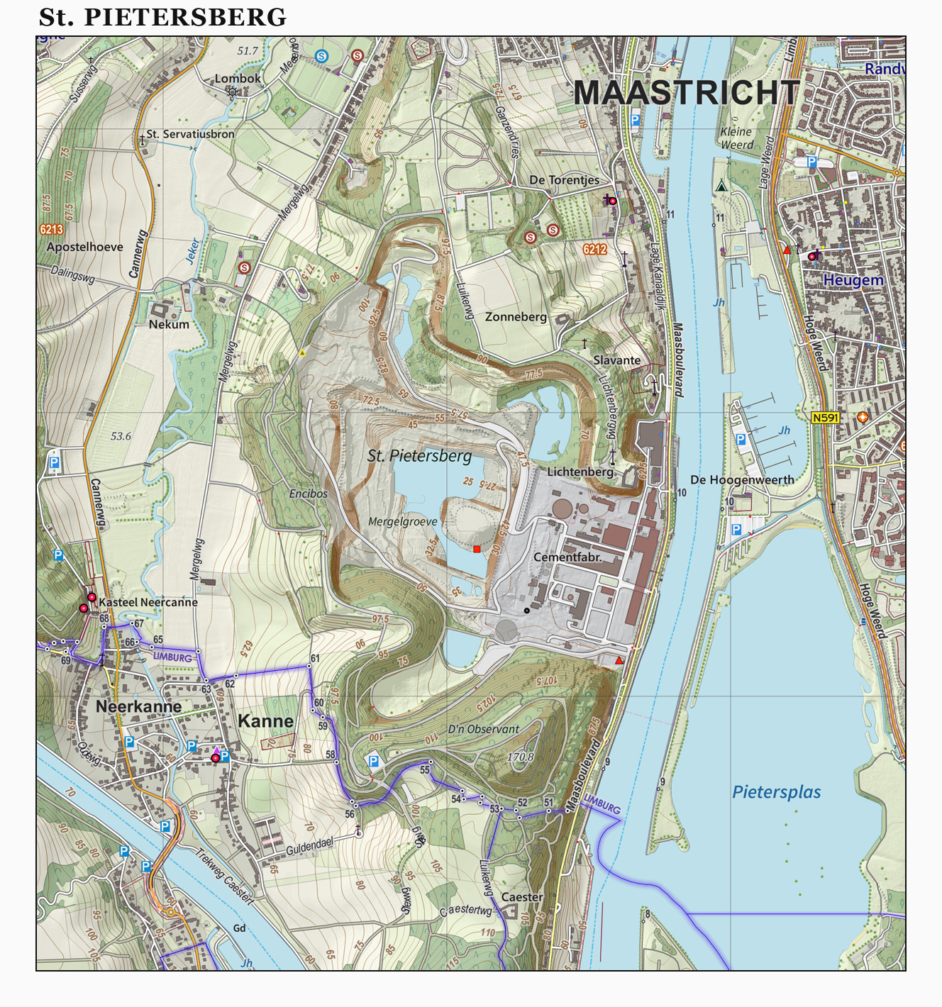 Topografische kaart van de St. Pietersberg (natuurgebied). Resolutie: 400 pixels/km. Samengesteld door Jan-Willem van Aalst op basis van de GML open geodata van de BRT/Top10NL (basisregistratie Topografie, Kadaster), vrijgegeven door Kadaster onder de Creative Commons BY licentie. Additionele gegevens uit BAG uit de Open Street Map en uit de Risicokaart. Zie ook de Legenda.